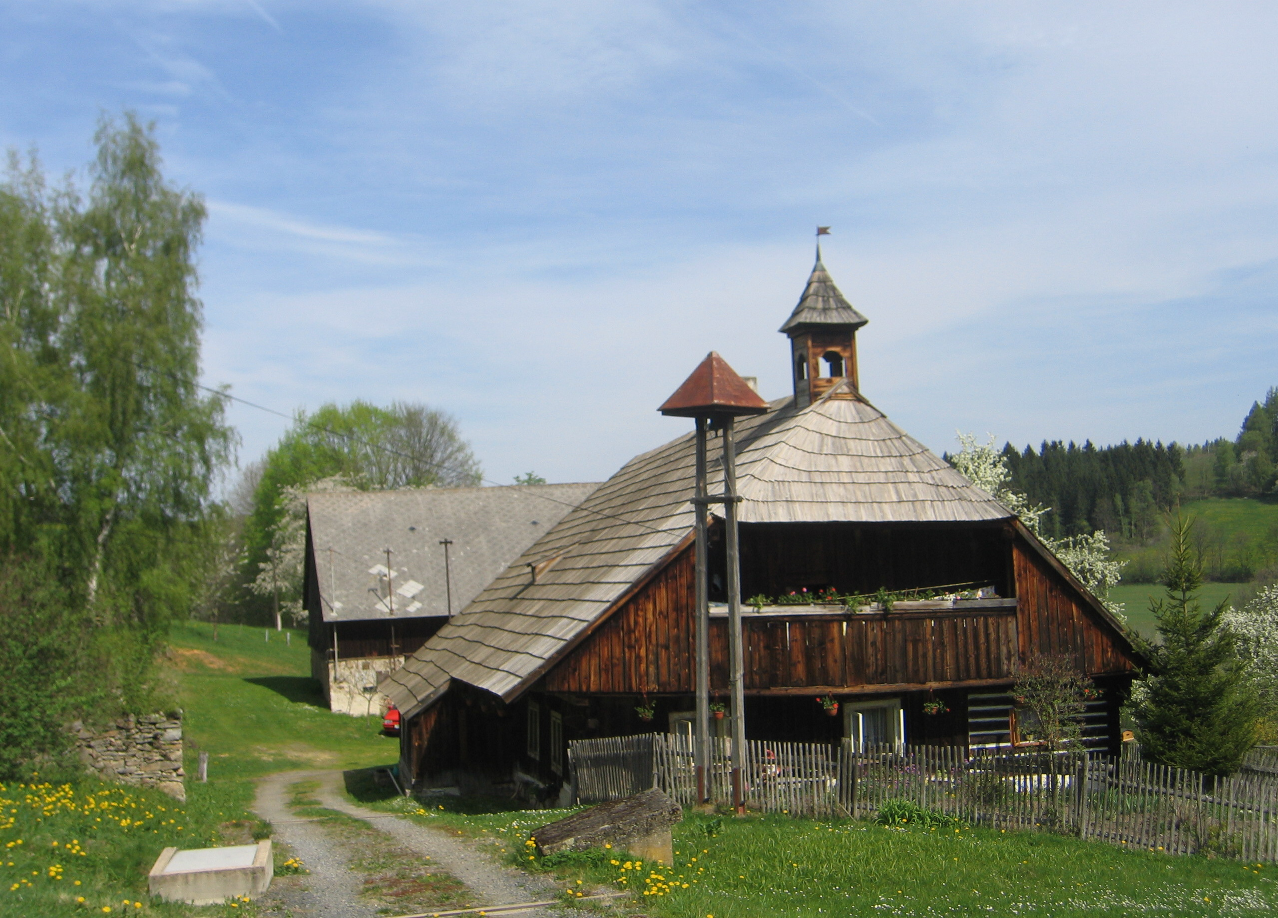 Venkovská usedlost (Zvíkov), Zvíkov 3